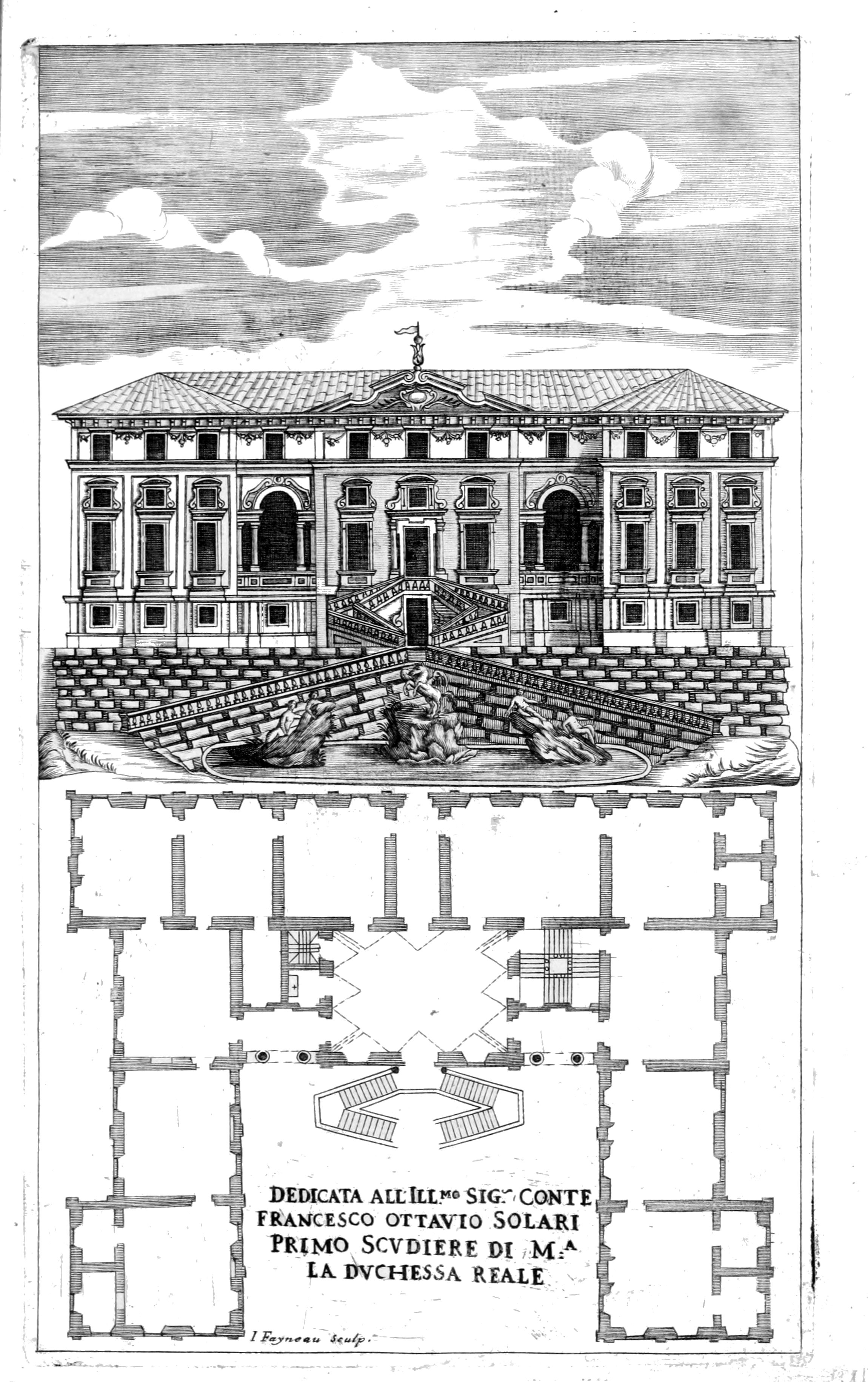 Senza titolo (Pianta e prospetto di un palazzo)